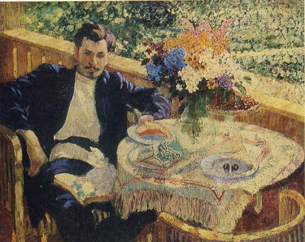 Портрет искусствоведа В.М. Лобанова 1913 г. Музей-усадьба А.М.Герасимова (Мичуринск). Портрет написан в имении В.А. Гиляровского в Подмосковье. Изображен зять В.А. Гиляровского, автор первой монографии об А.М. Герасимове. Находится в постоянной экспозиции выставочного зала музея